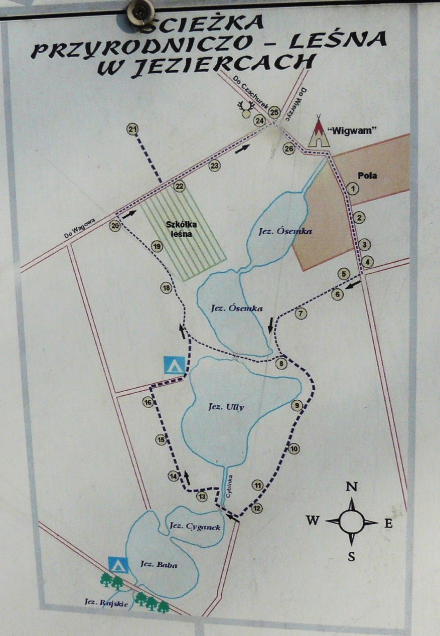 Mapa jezior Babskich. Tablica informacyjna przy leśniczówce Jezierce.